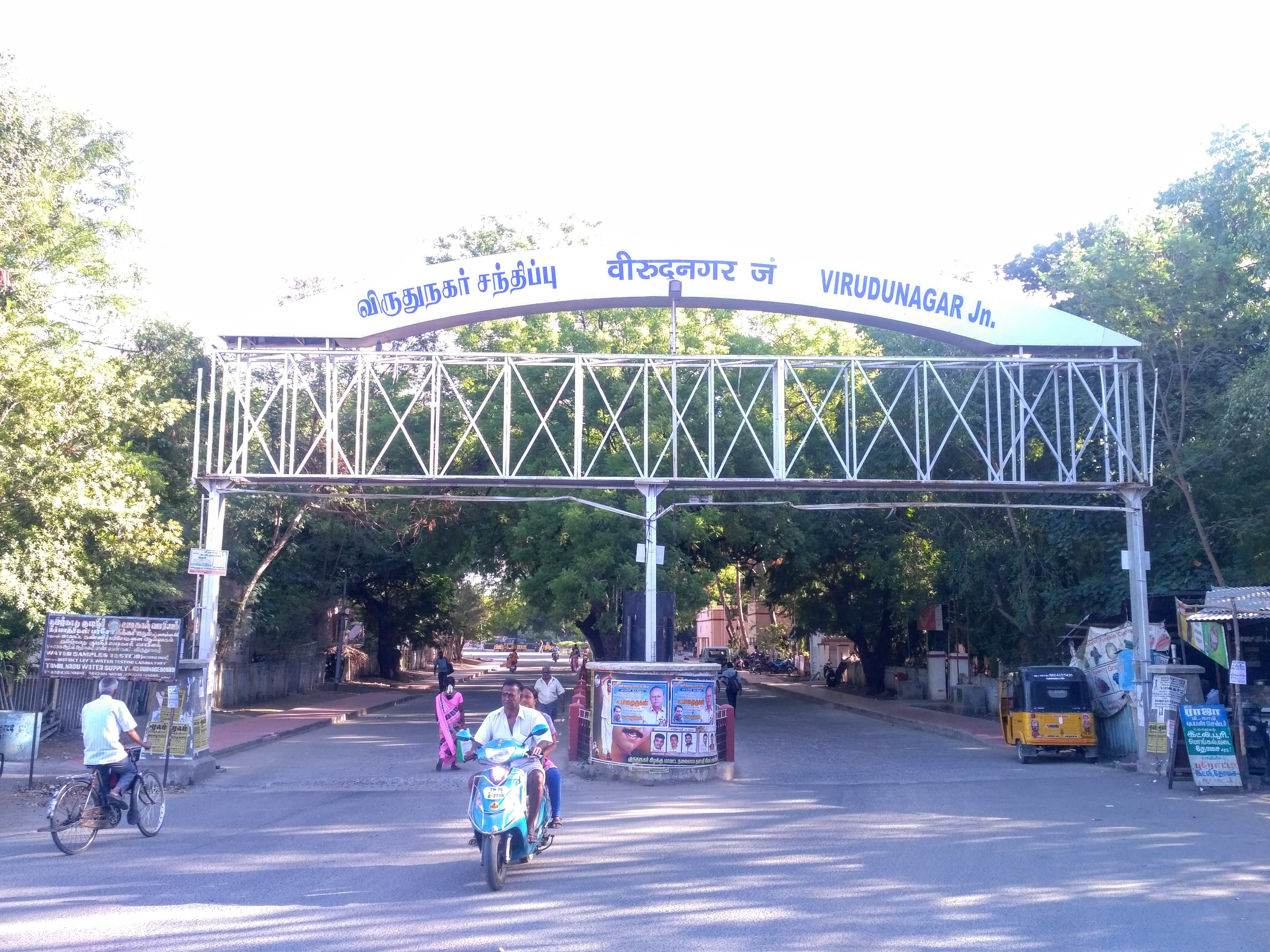 விருதுநகர் இரயில் நிலையத்தின் நுழைவாயில்.